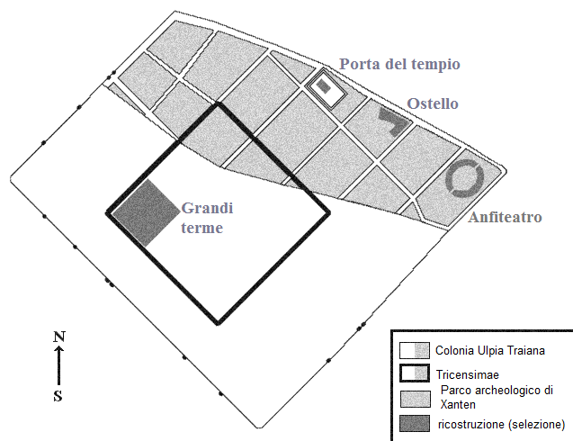 Pianta del parco archeologico di Xanten. Versione italiana di File:Cut.png